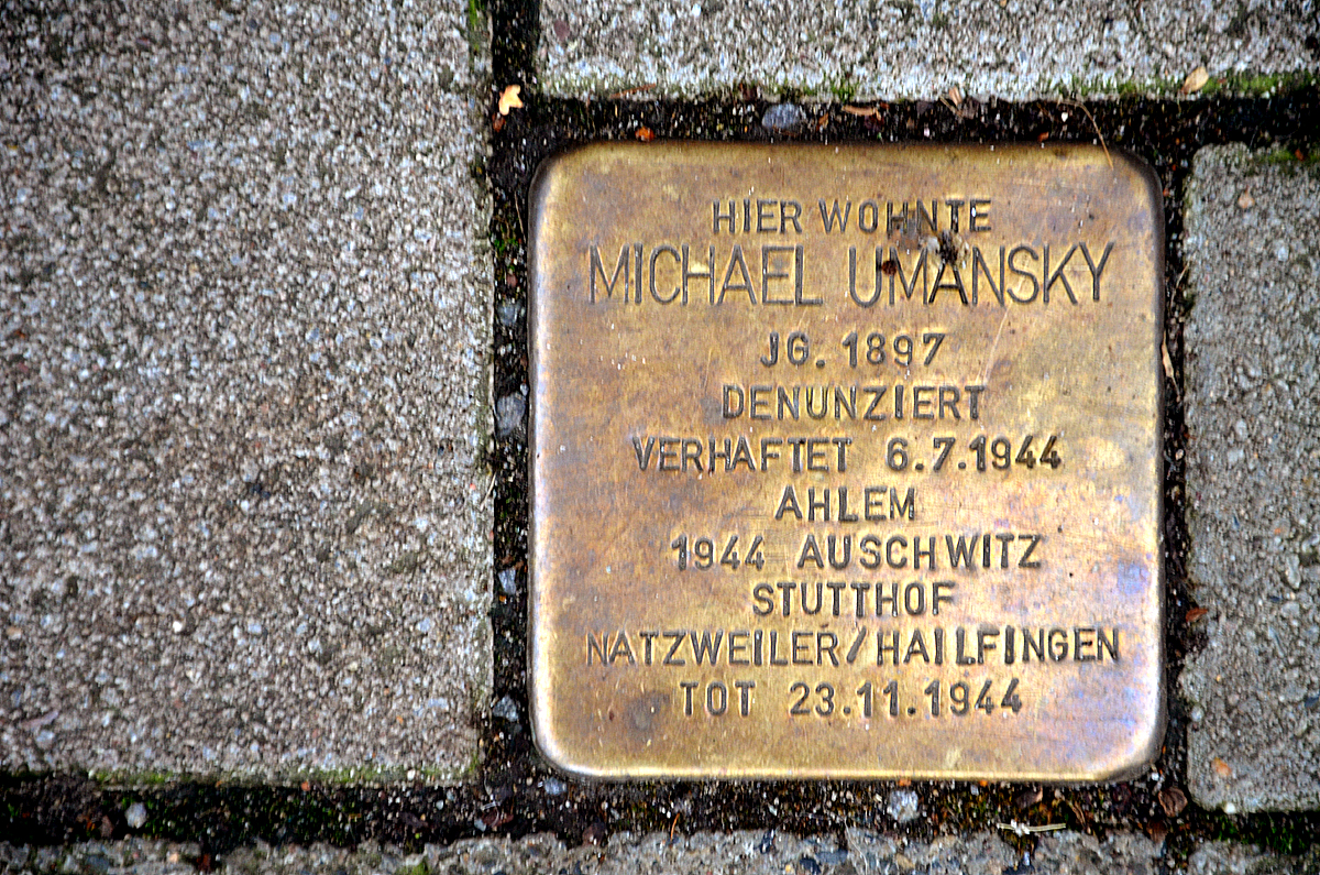 Stolperstein vor der Haustür der Podbielskistraße 274 (Teil der Liststadt zur Erinnerung an das Schicksal eines weiteren NS-Opfers, mit der Aufschrift „Hier wohnte / MICHAEL UMANSKY / Jg. 1897 / denunziert / verhaftet 6.7.1944 / Ahlem / 1944 Auschwitz / Stutthof / Natzweiler / Hailfingen / Tot 23.11.1944“ ...